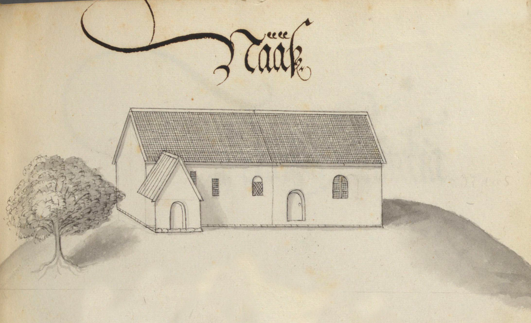 Vänersnäs kyrka. Kyrka, äldre, teckning ur Peringskiölds Monumenta, avfotograferad i färg.